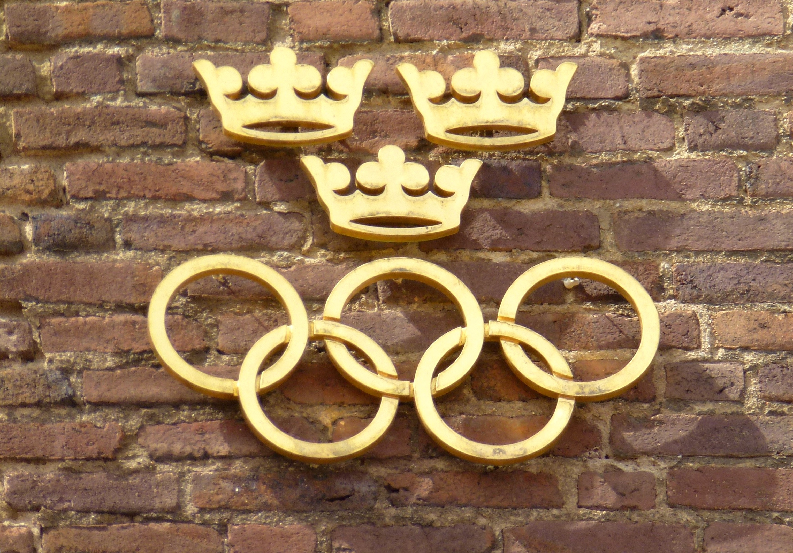 Stockholms stadion olympiska ringar